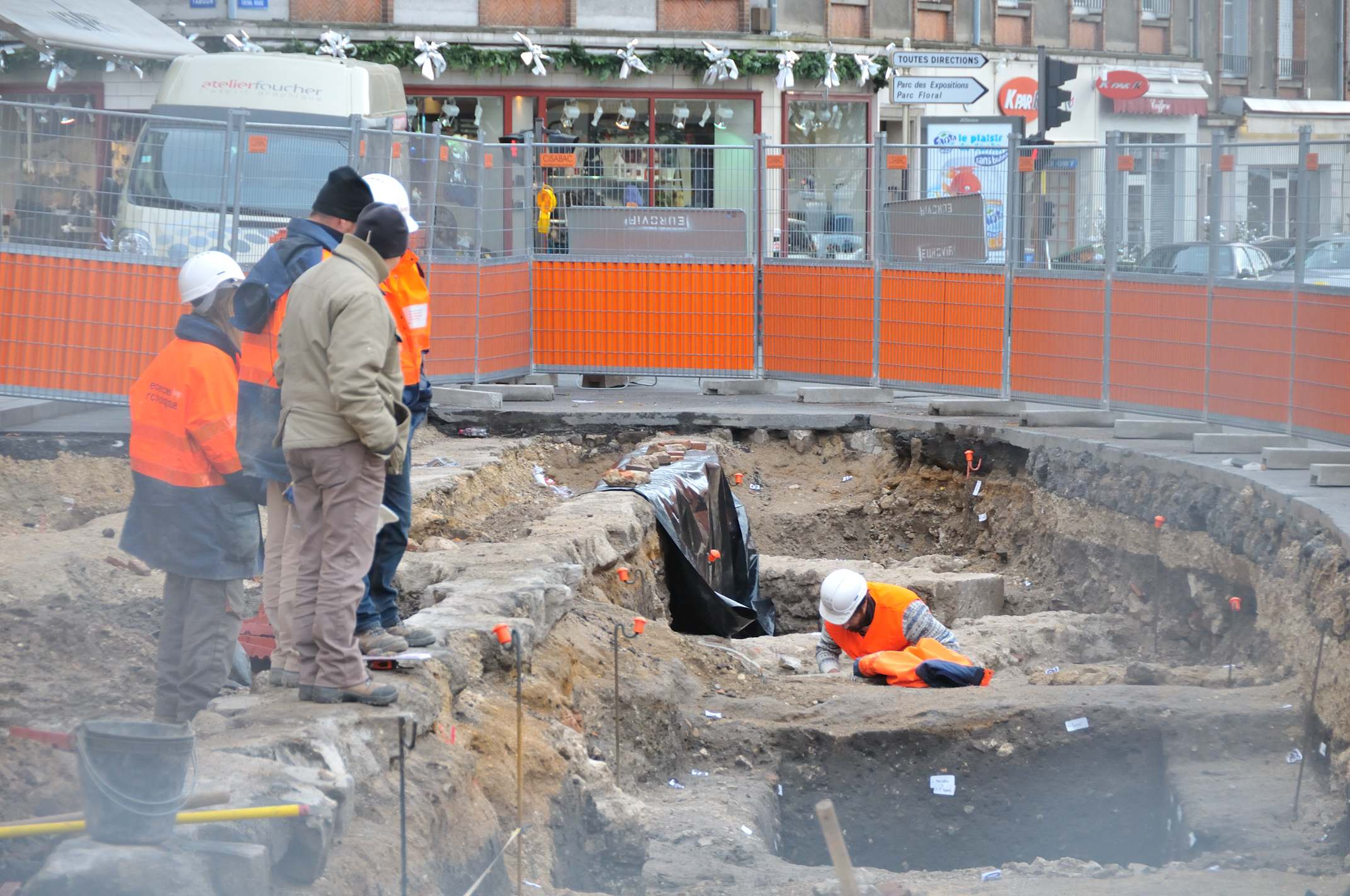 Travaux préparatoires à la construction de la ligne B du tramway : fouilles archéologiques place De Gaulle, Orléans, Loiret, France